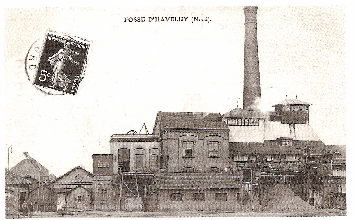 Ancienne fosse Haveluy arrêtée à l'extraction en 1936 et remblayée en 1954.